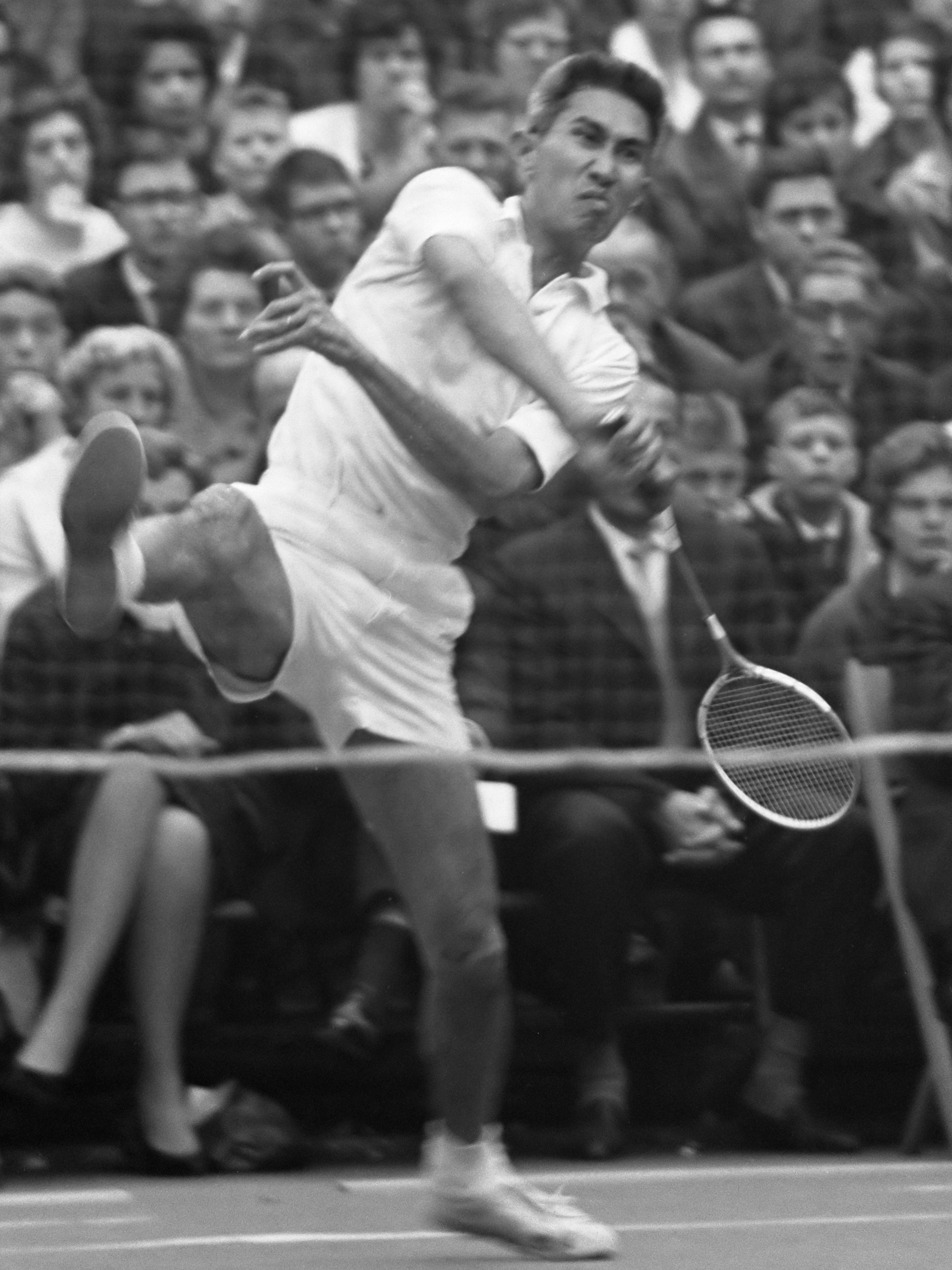 Internationale Badmintonkampioenschappen Haarlem in nieuw "Duinwijck" hal. Sonneville 11 februari 1962